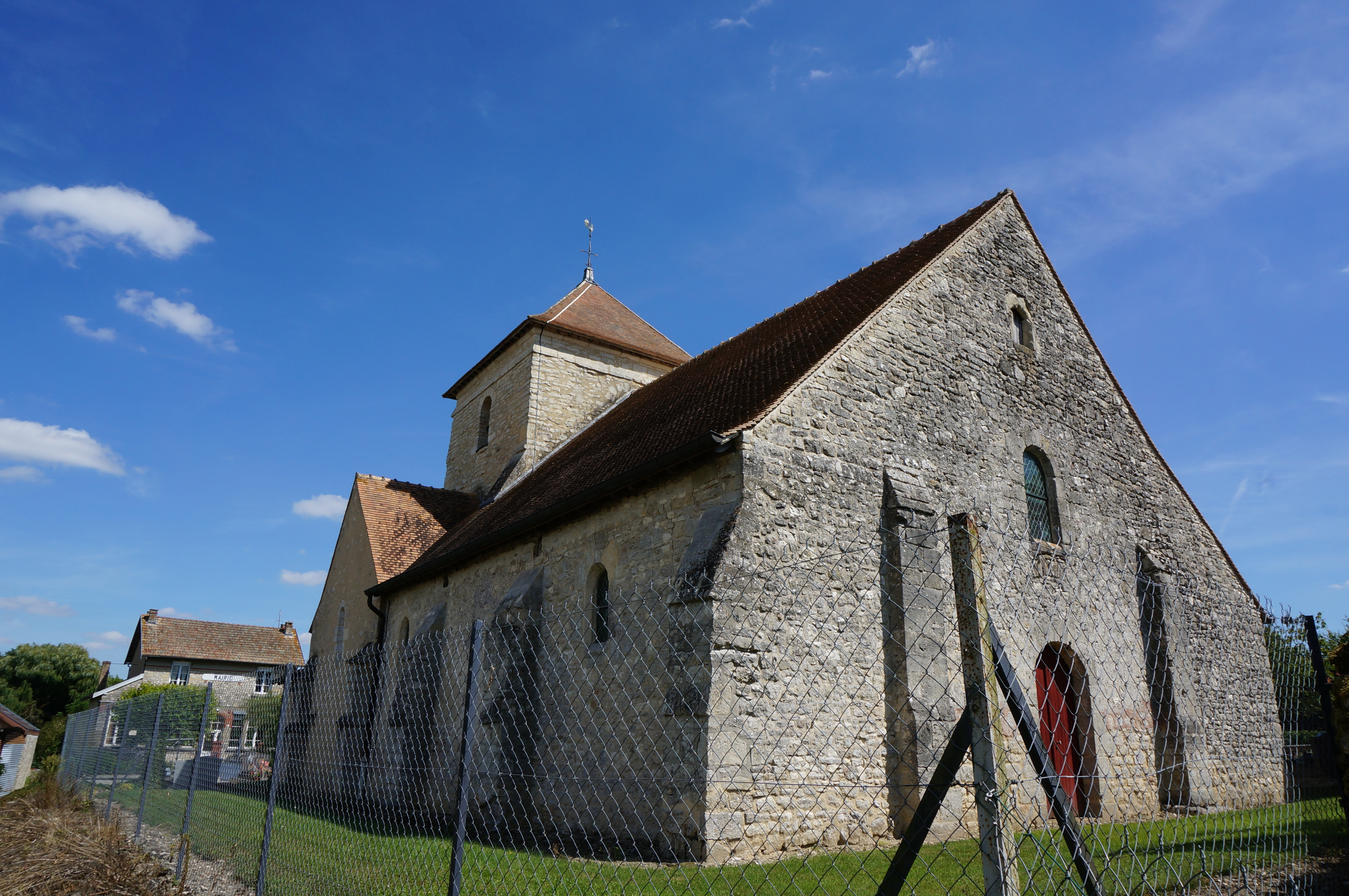 vue de l'église entourée du cimetière .